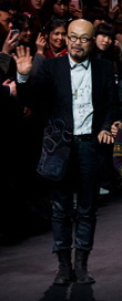 2012 F/W 서울패션위크 도네이션 런웨이